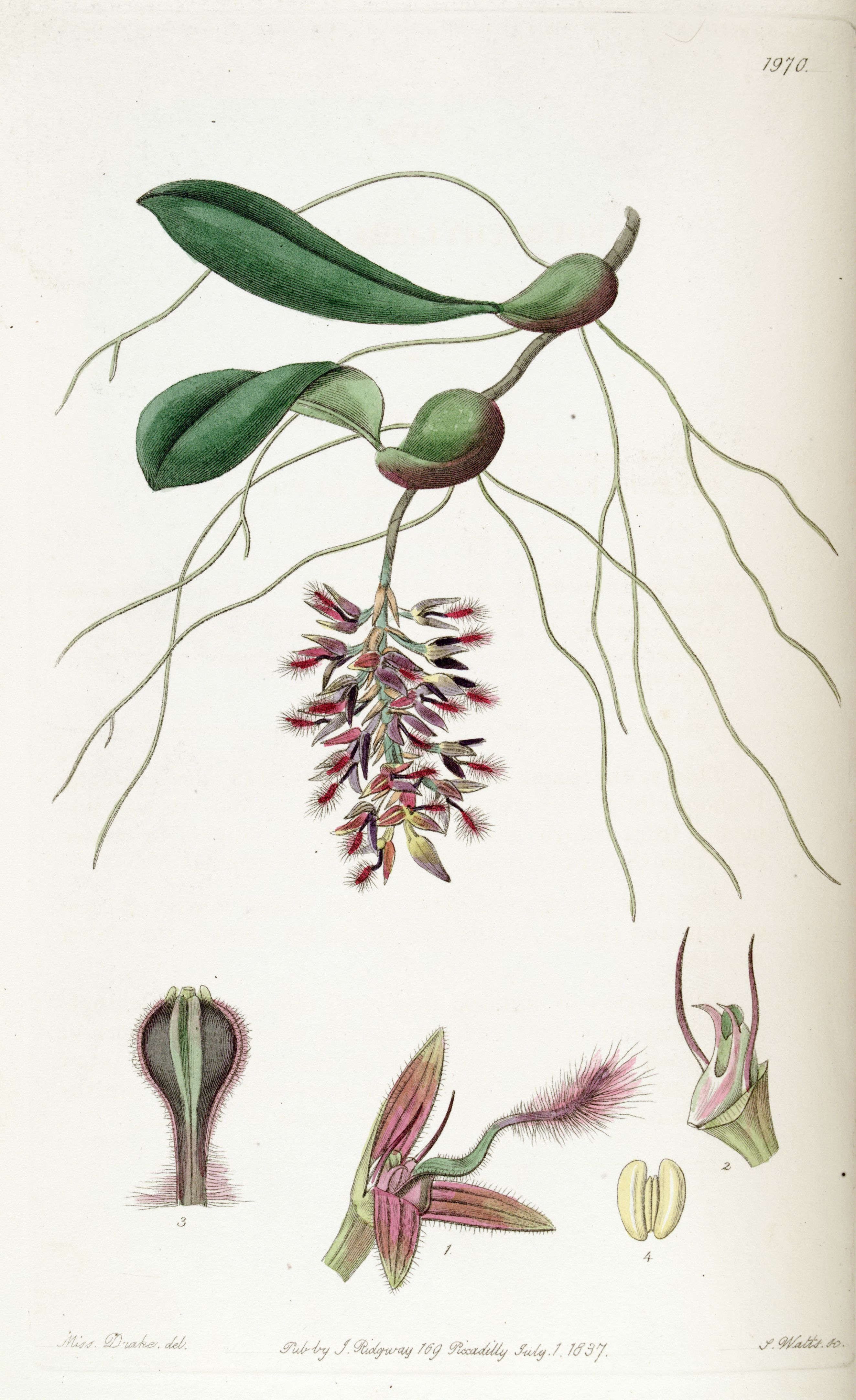 Bulbophyllum saltatorium (spelled Bolbophyllum saltatorium)